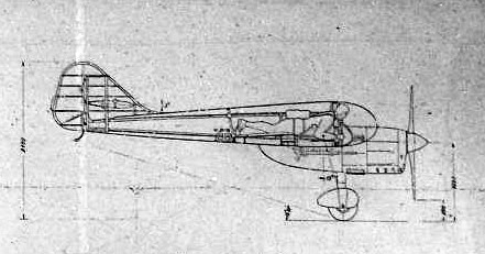 Ikarus 232 Pionir 3